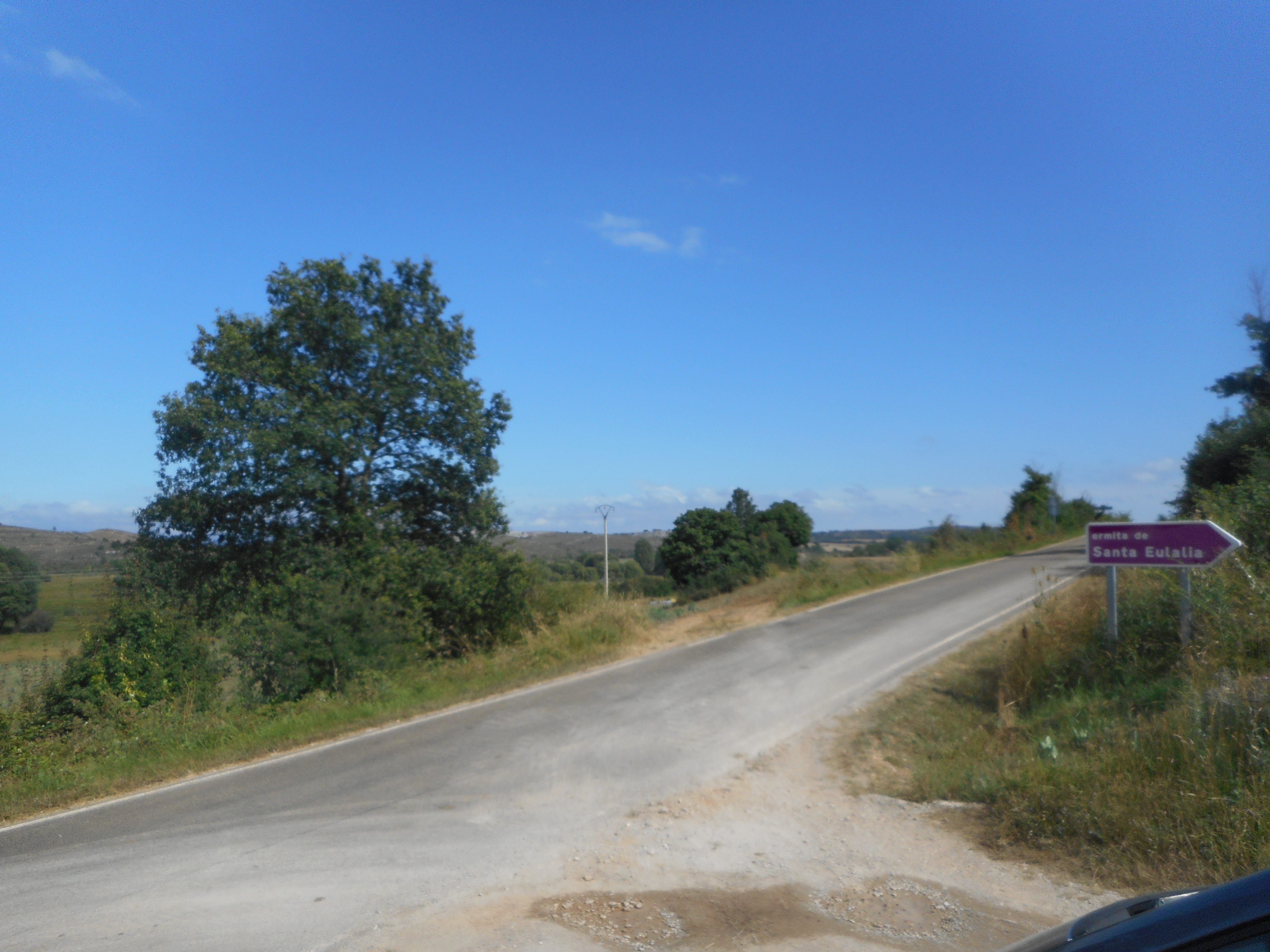 Acceso a la ermita de Sta. Eulalia en Barrio de San Pedro (Aguilar de Campoo, Palencia, España) desde la carretera P-2132